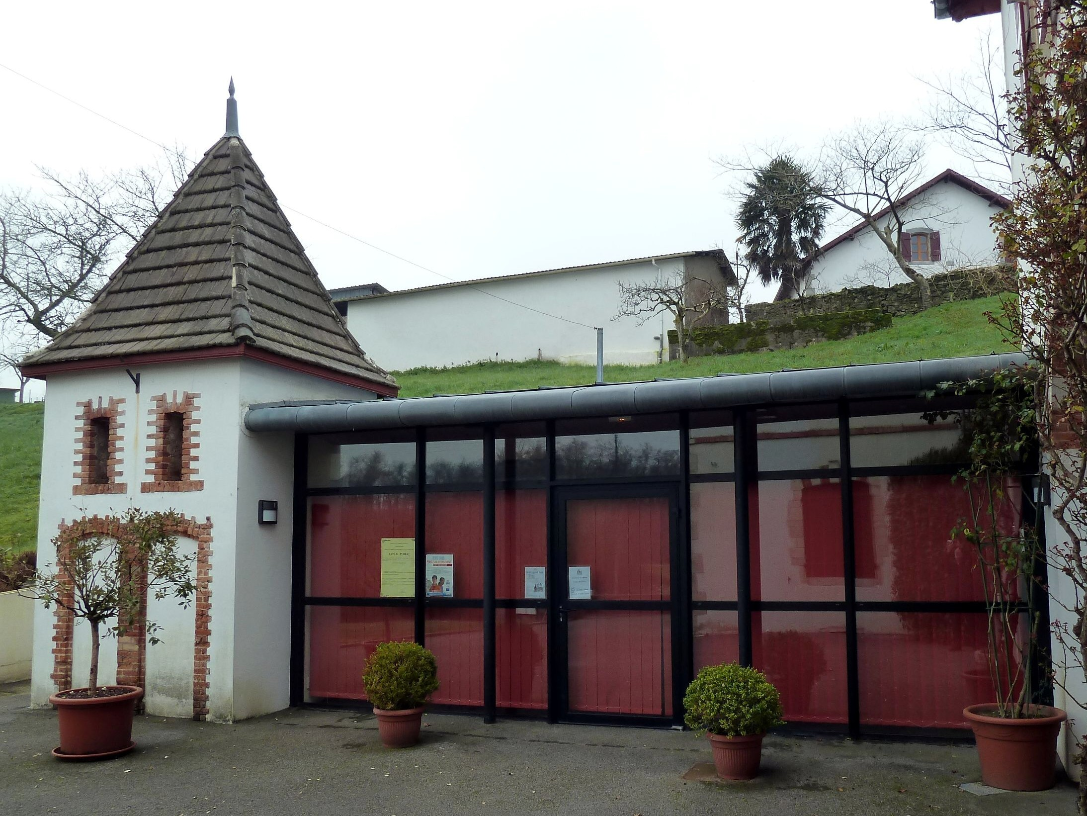 Nouvelle mairie